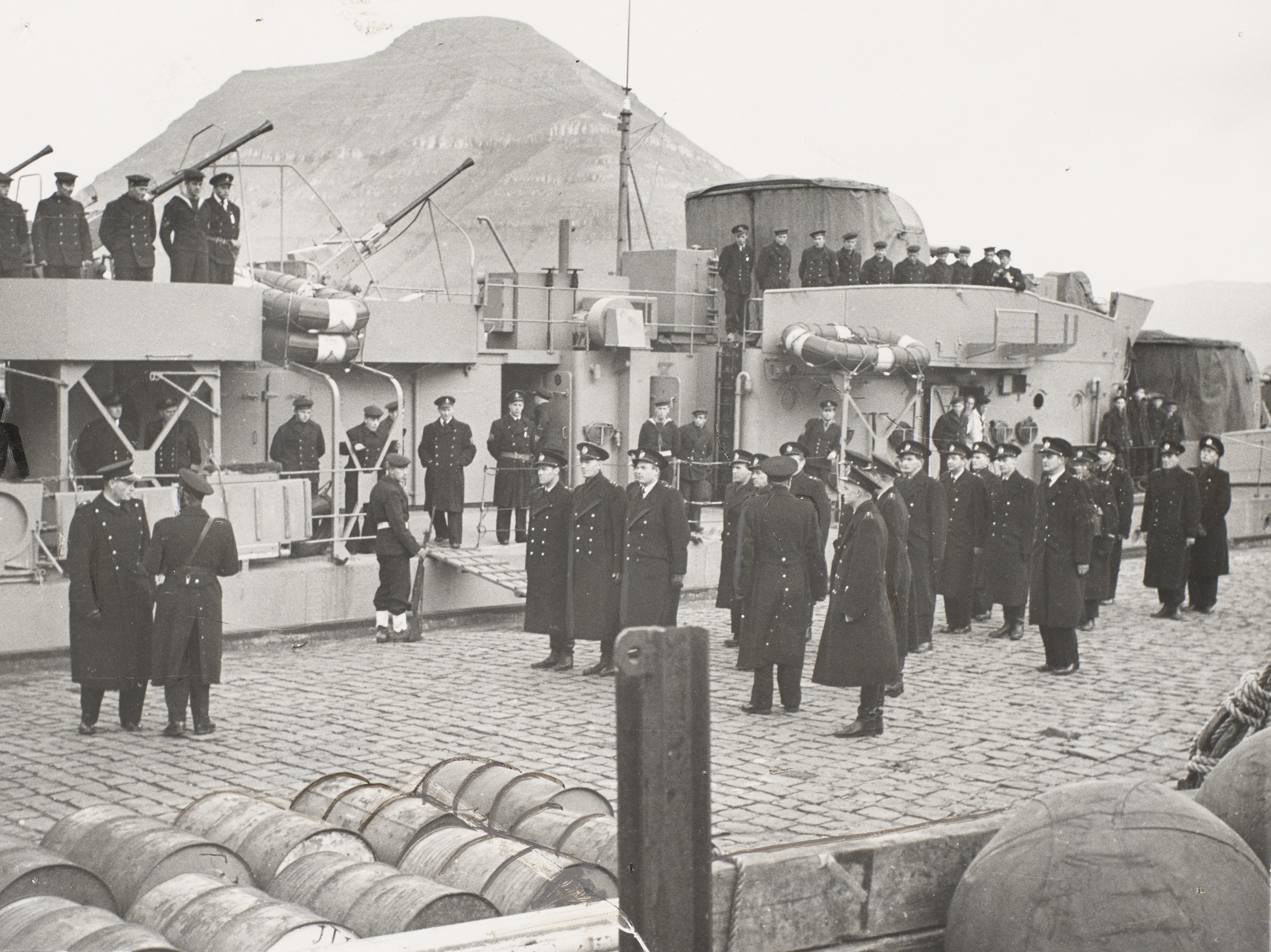 "Rolf Krake" i Klaksvig under den såkaldte Klaksvigstrid, hvor fyringen af Halvorsen på grund af hans fortid i nazistiske SS førte til uroligheder.